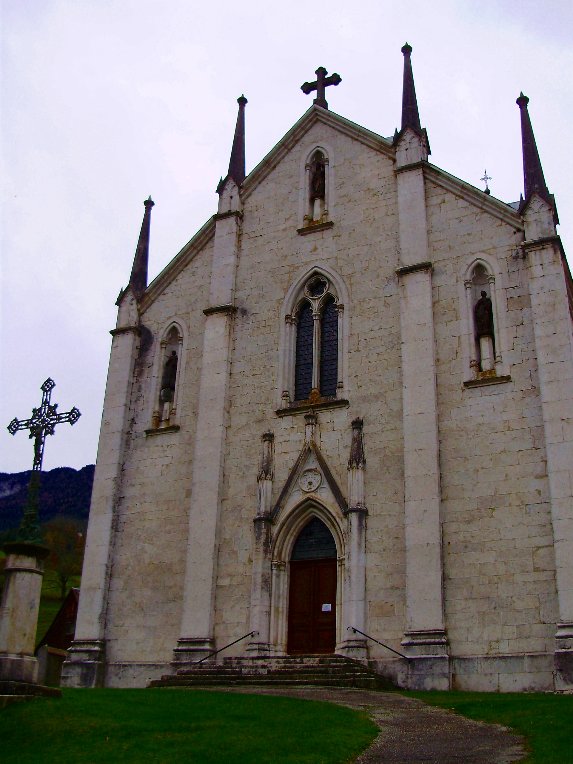 Eglise Saint-Pierre de Saint-Pierre-d'Entremont.